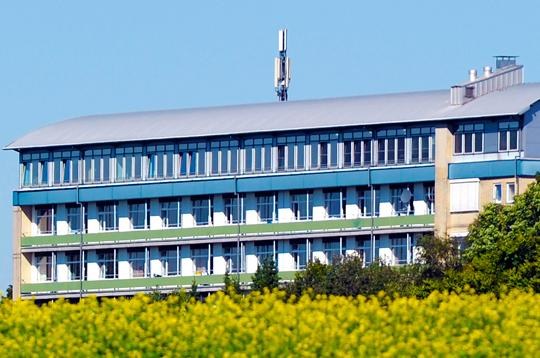 Klink Blankenstein, Hattingen